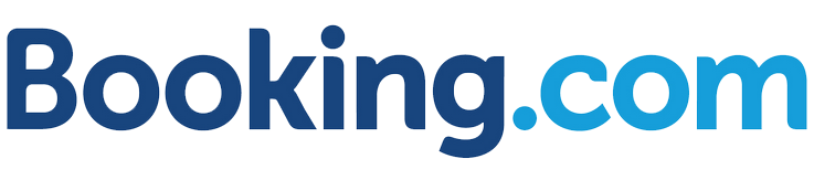 logo